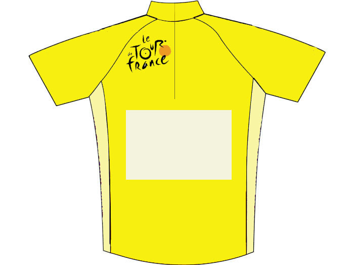 Tour de France - General Classification (maillot jaune) Autor: Jiří Žemlička